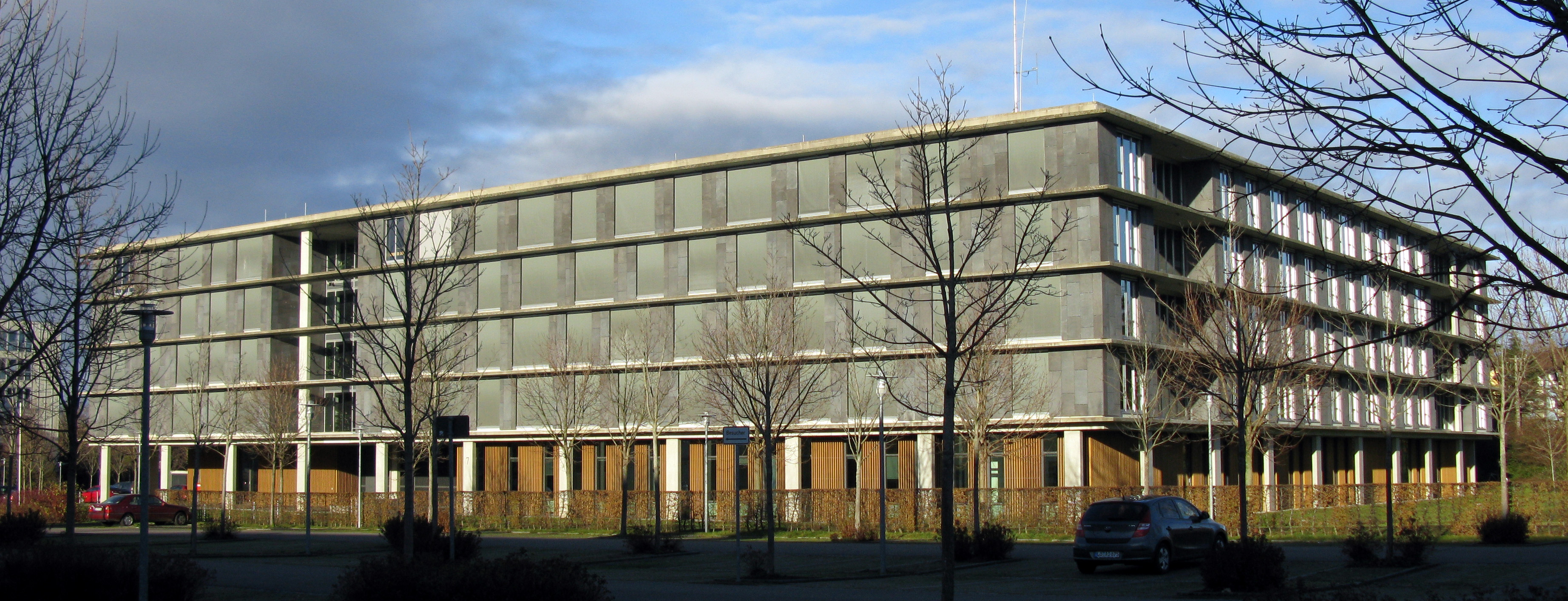 Regierungspräsidium Freiburg, Bissierstraße